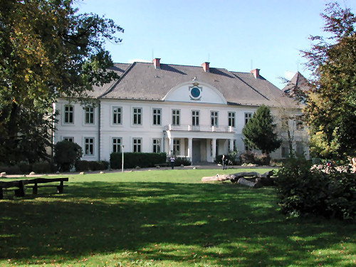 Description: Schloß Noer in Schleswig-Holstein, Deutschland (castle Noer in Germany) Photographer: Klaas Ole Kürtz Drbashir117 10.10.2002